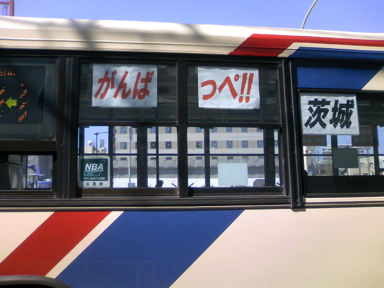 んだんだ